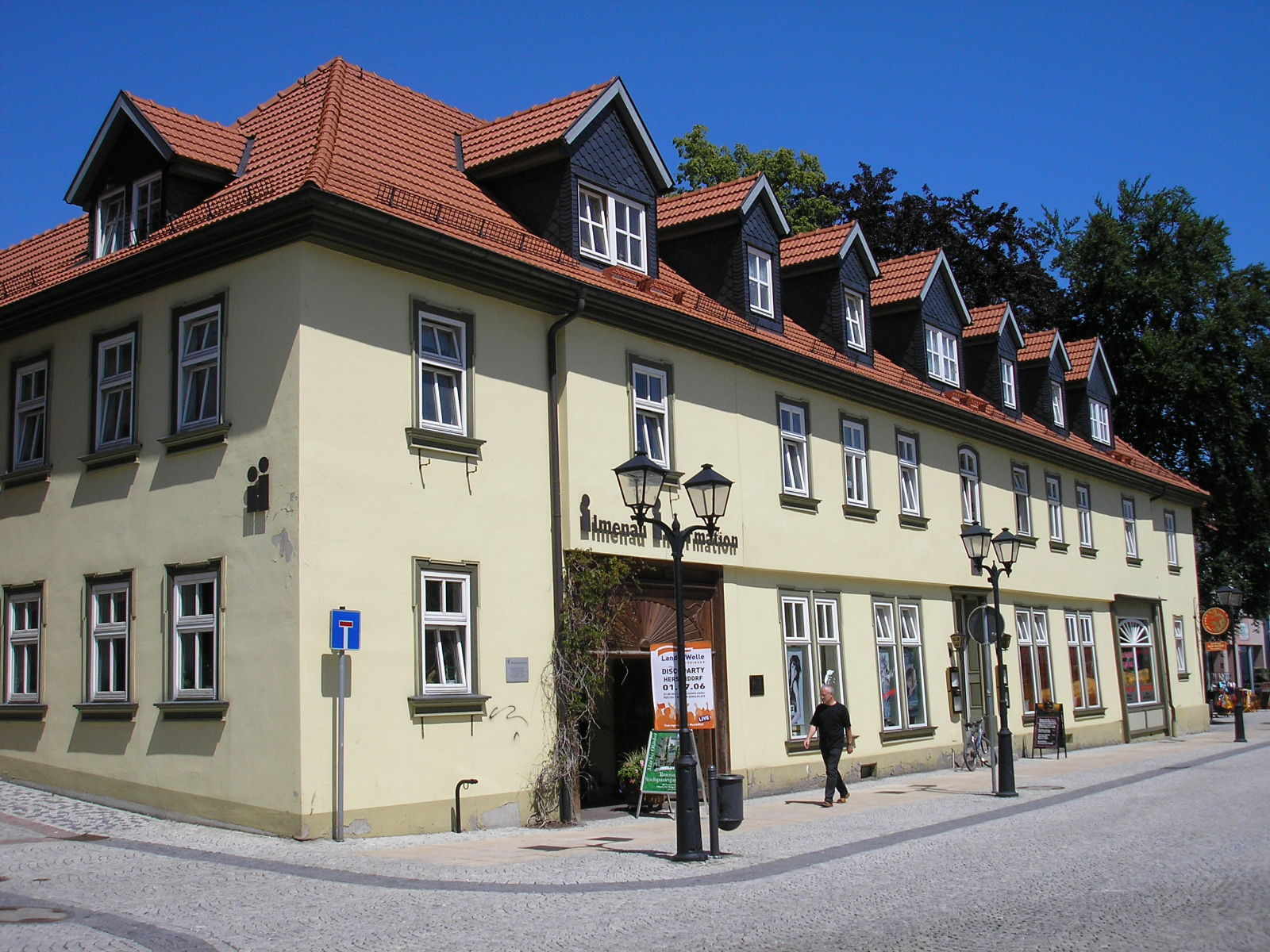 Das Wenzelsche Haus in Ilmenau (Thüringen).